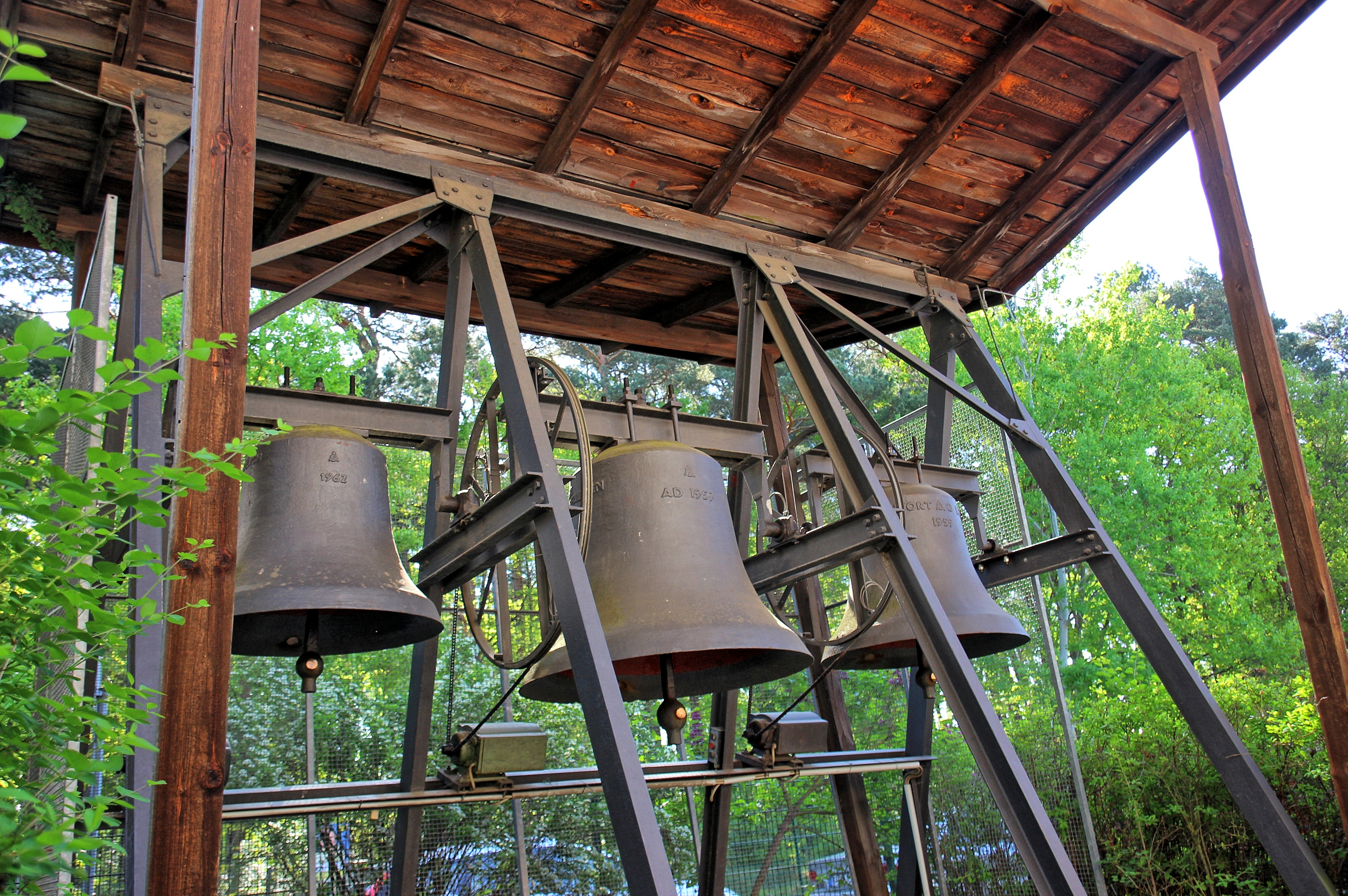 Dorfkirche Borgsdorf Hohen-Neuendorf Glockenstuhl